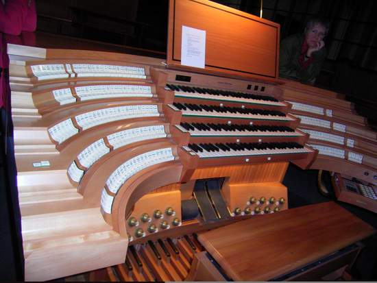 Tribune de l'orgue de Jean-Bernard Condat à la cathédrâle de Cologne